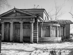 Усадьба В А Рассушина г Усолье ул Мира 20а